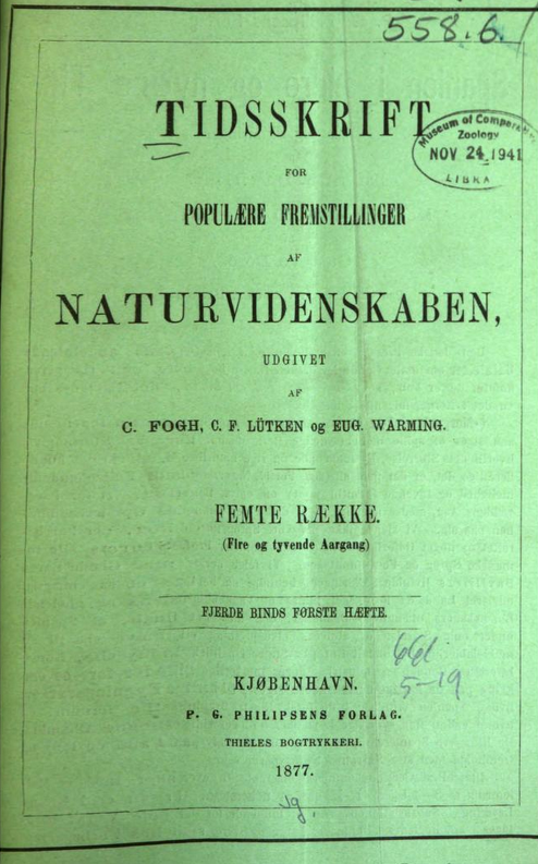 Tidsskrift for populære Fremstillinger af Naturvidenskaben 1877, Femte Række, Fire og tyvende Aargang, Fjerde Binds første Hefte - Kjøbenhavn - P.G. Philipsens Forlag - Tidsskriftet udkom 1854-1883